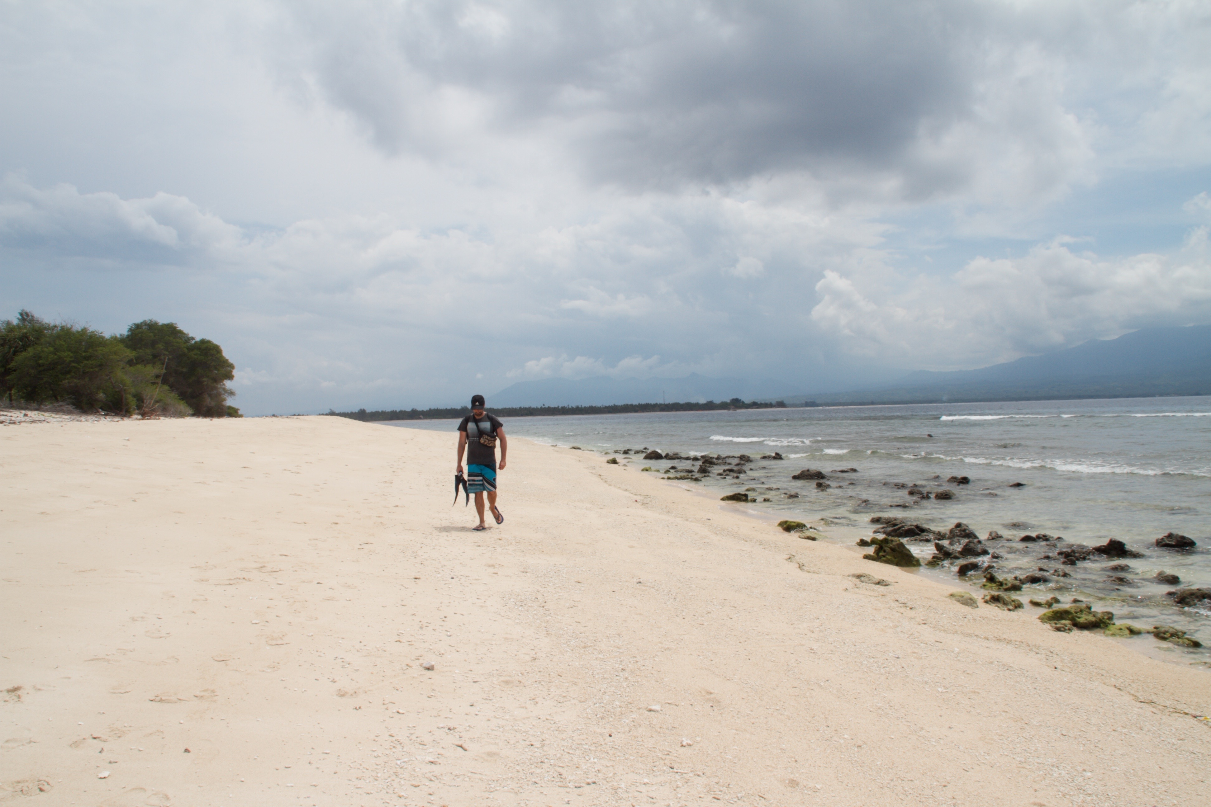 Playa de arena blanca en Gili Air-Lombok